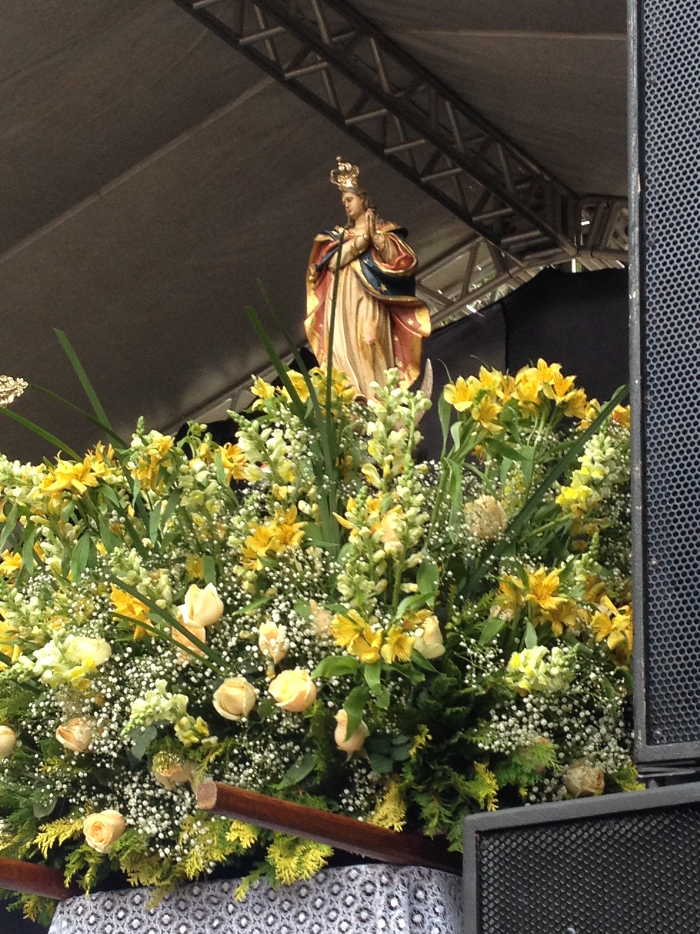 Nossa Senhora da Lapa em passeada, 15 de Agosto, festa tradicional de Antônio Pereira.